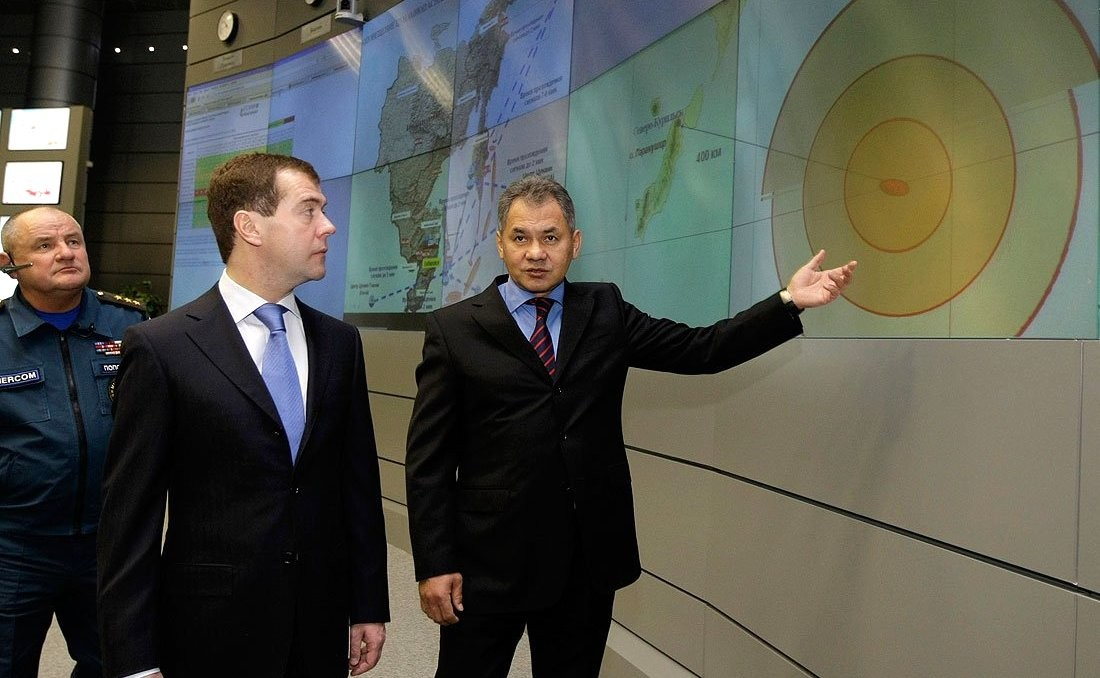 Во время посещения президентом Национального центра управления в кризисных ситуациях МЧС.